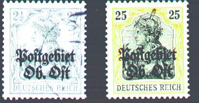 почтовые марки Postgebiet Ob. Ost (Почтовая зона Верховного главнокомандующего на Востоке)